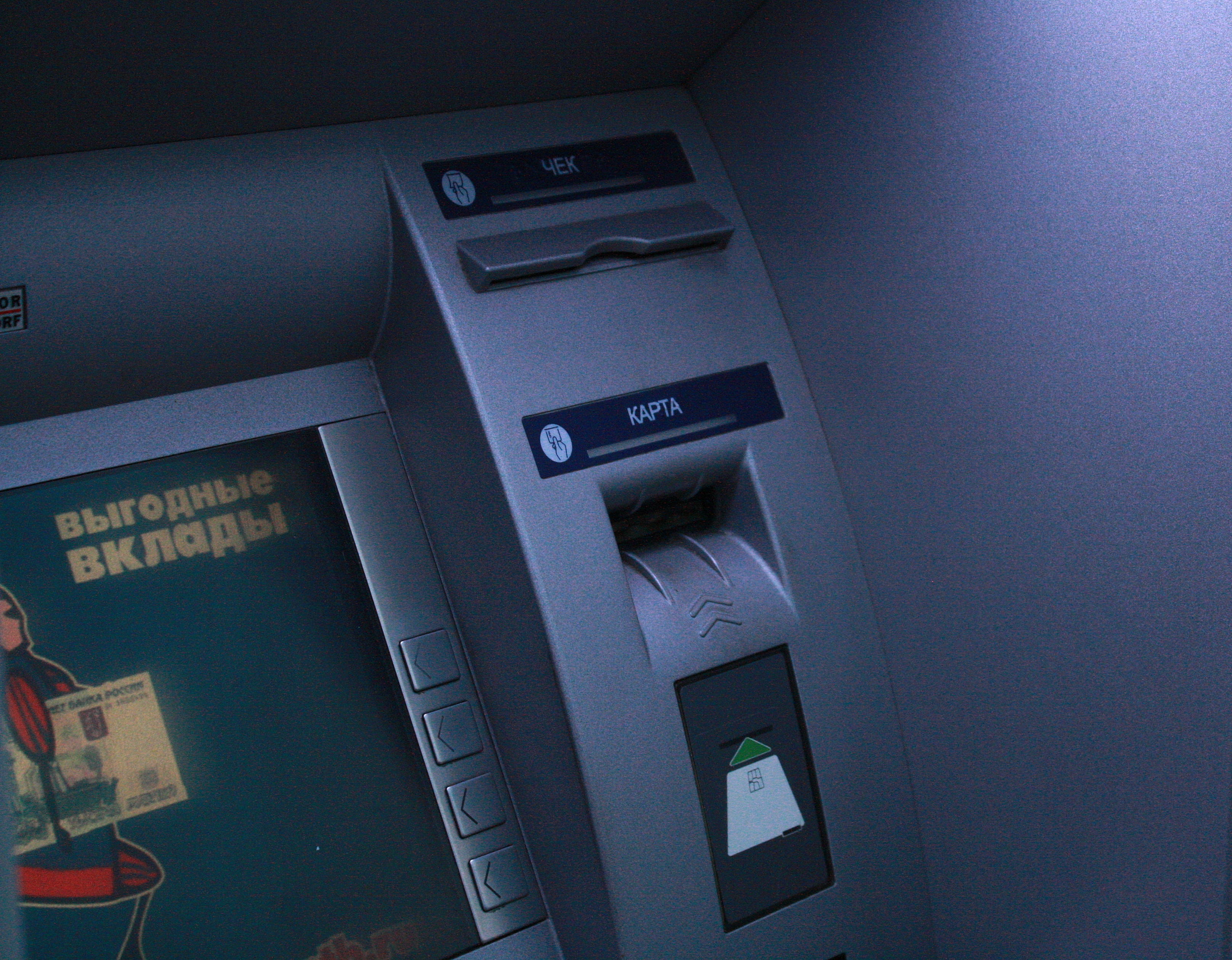 Крупный план одного из банкоматов г.Тольятти. Зима 2012 г.